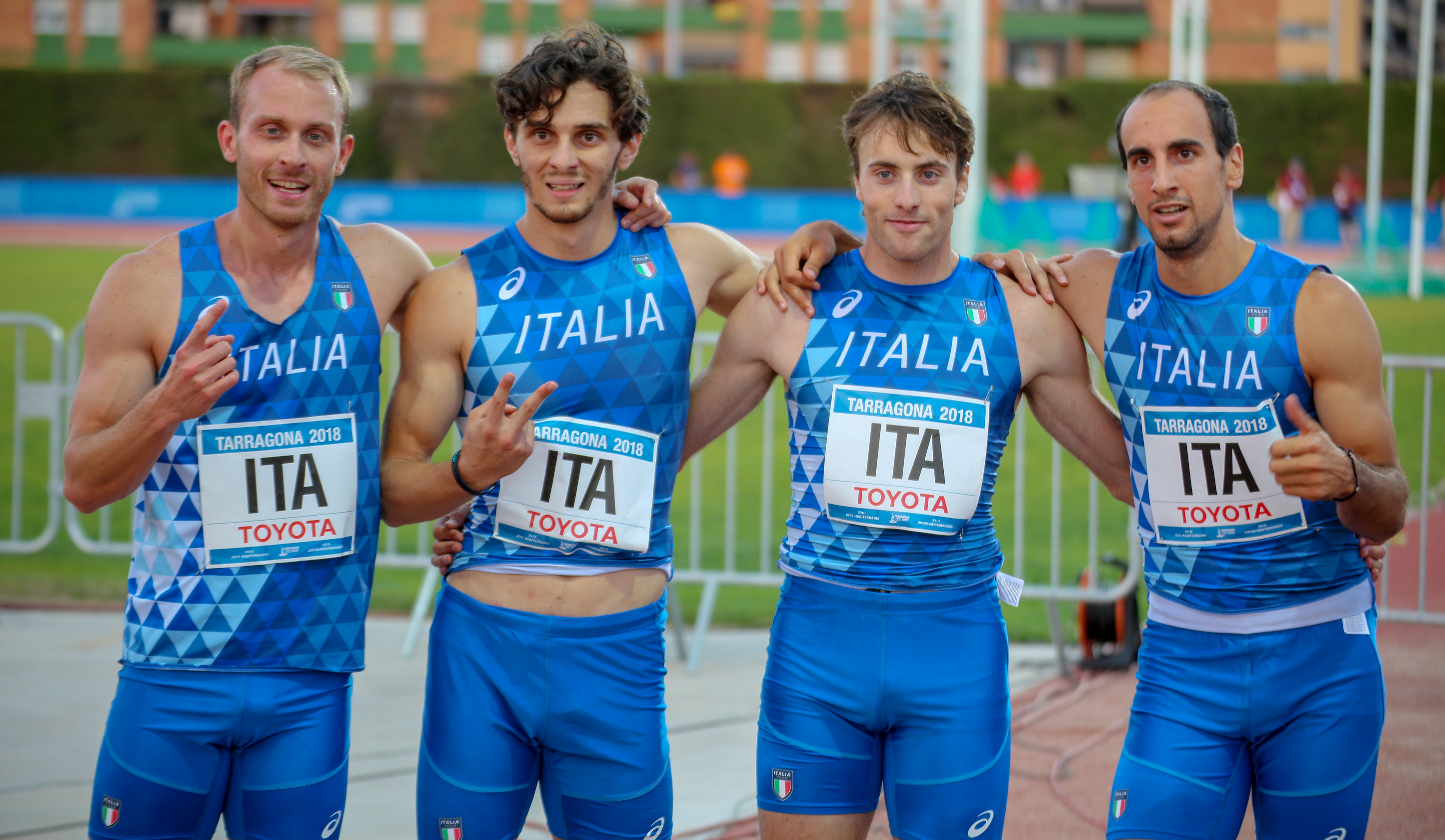 Italia en los relevos 4x400 en los Juegos del Mediterráneo 2018 (Matteo Galvan, Giuseppe Leonardi, Michele Tricca, Davide Re)